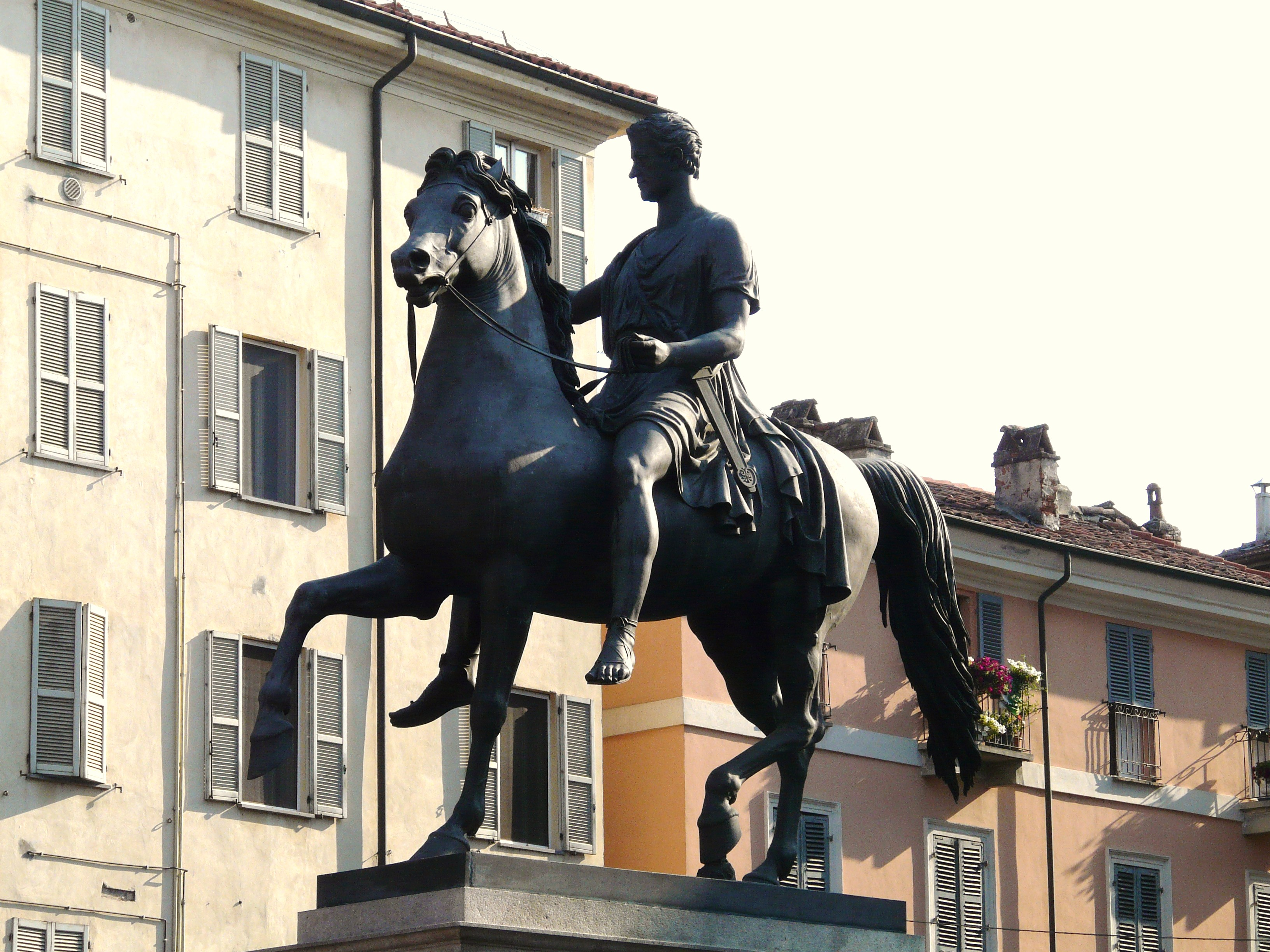 Piazza Giuseppe Mazzini, Casale Monferrato, Piemonte, Italia